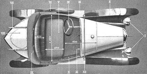 Vue de dessus de la Citroen 5HP Torpedo T2 montrant la disposition des deux sieges